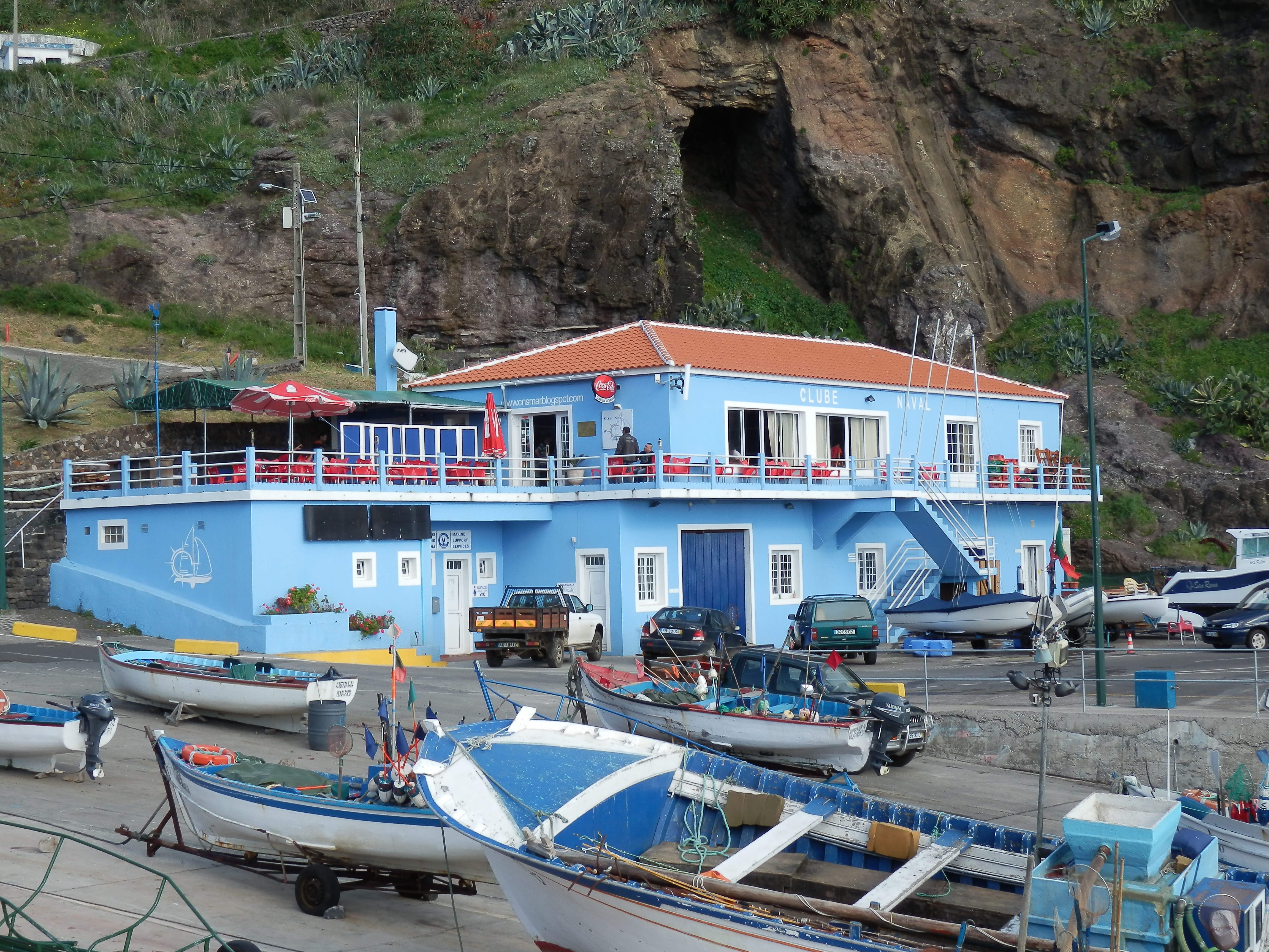 Clube Naval de Santa Maria: sede social do Clube no cais de Vila do Porto, ilha de Santa Maria, Açores.